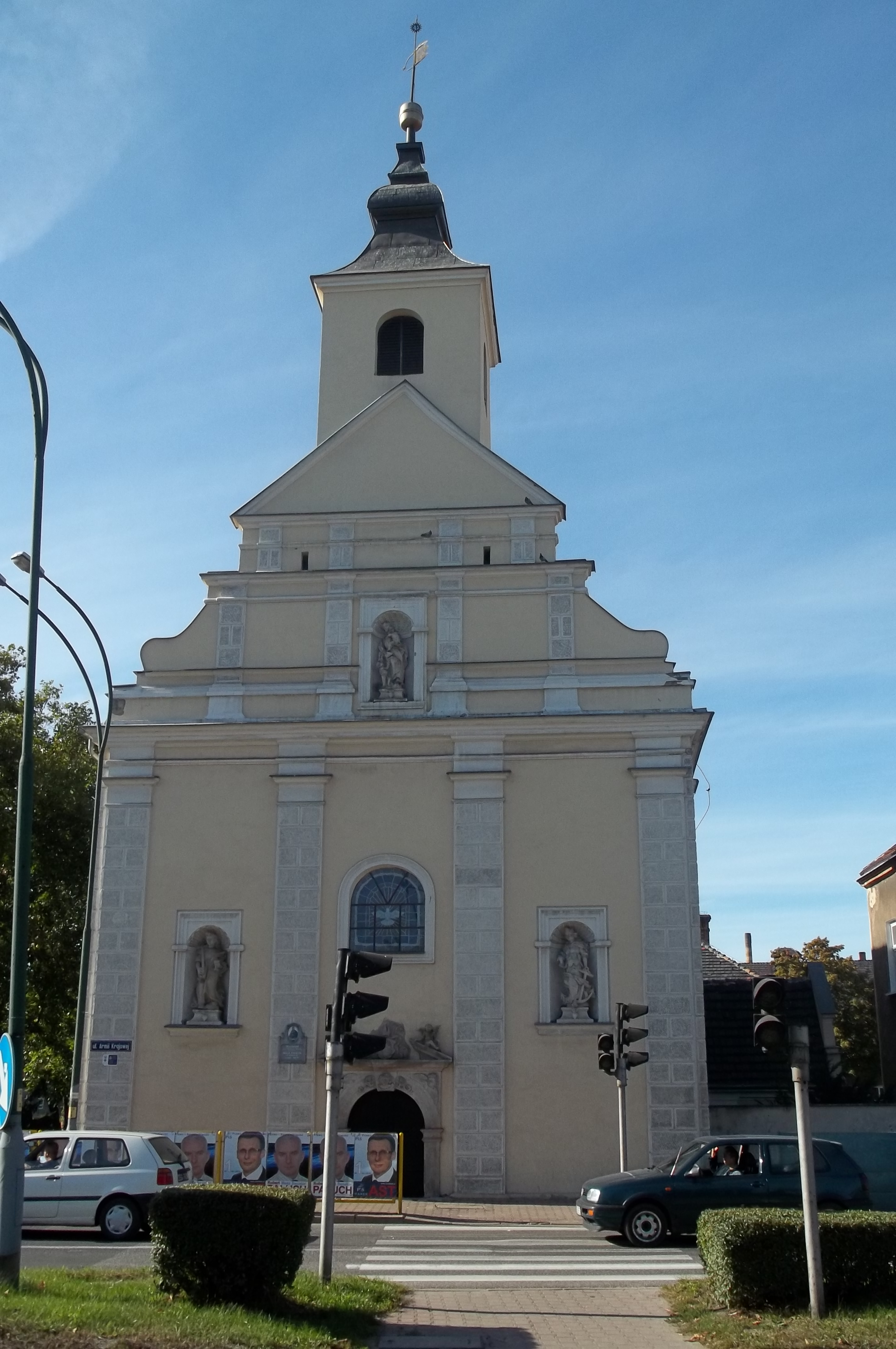 Żagań ul. Armii Krajowej - kościół fil. p.w. Świętego Ducha